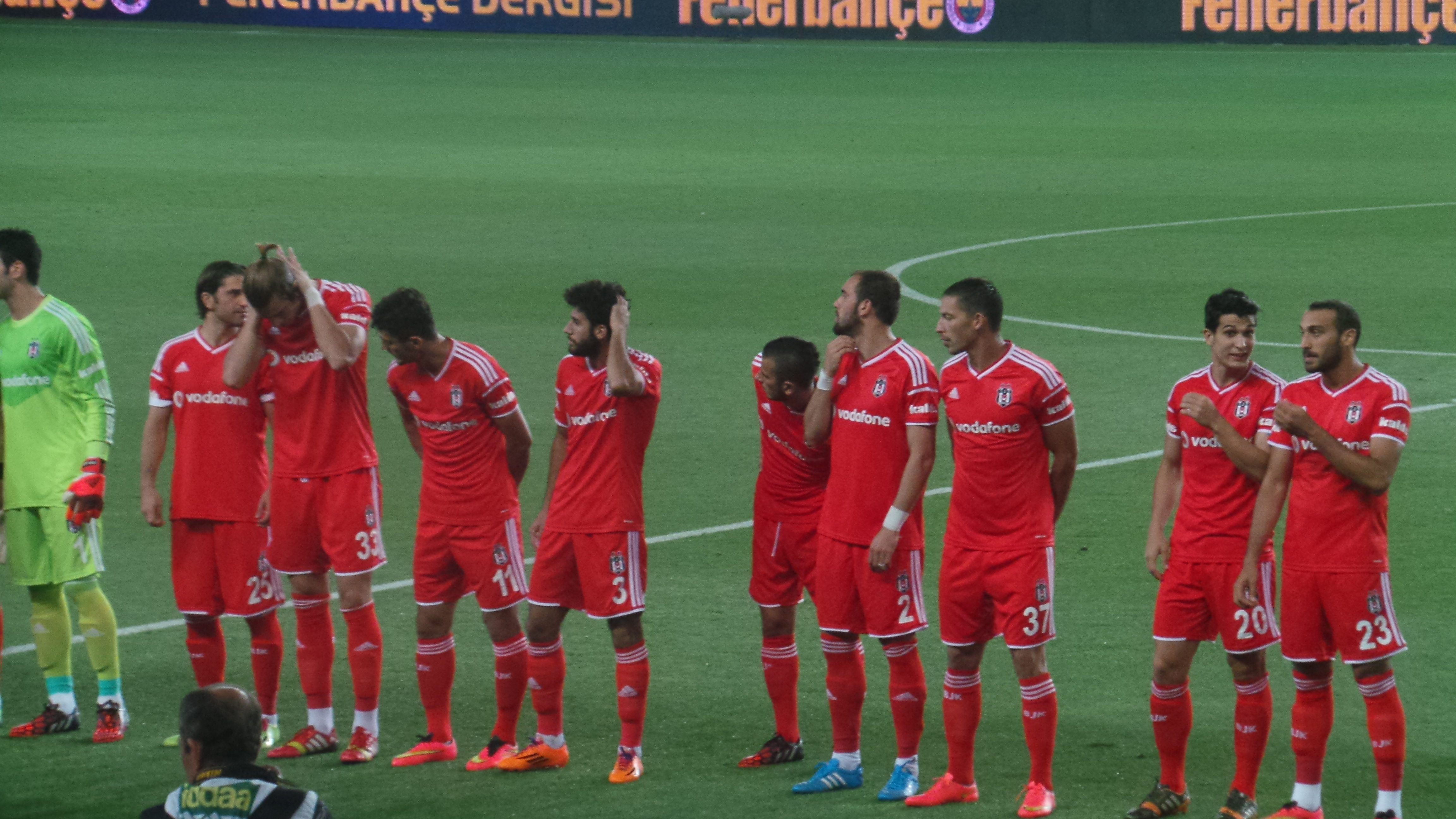 Beşiktaş'ın 2014-15 sezonundan bir kadrosu